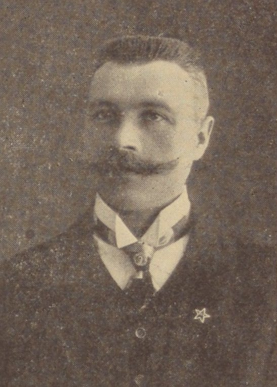 Partoprenantoj de UK 1912 el la albumo VIII. Universala Kongreso Esperantista.